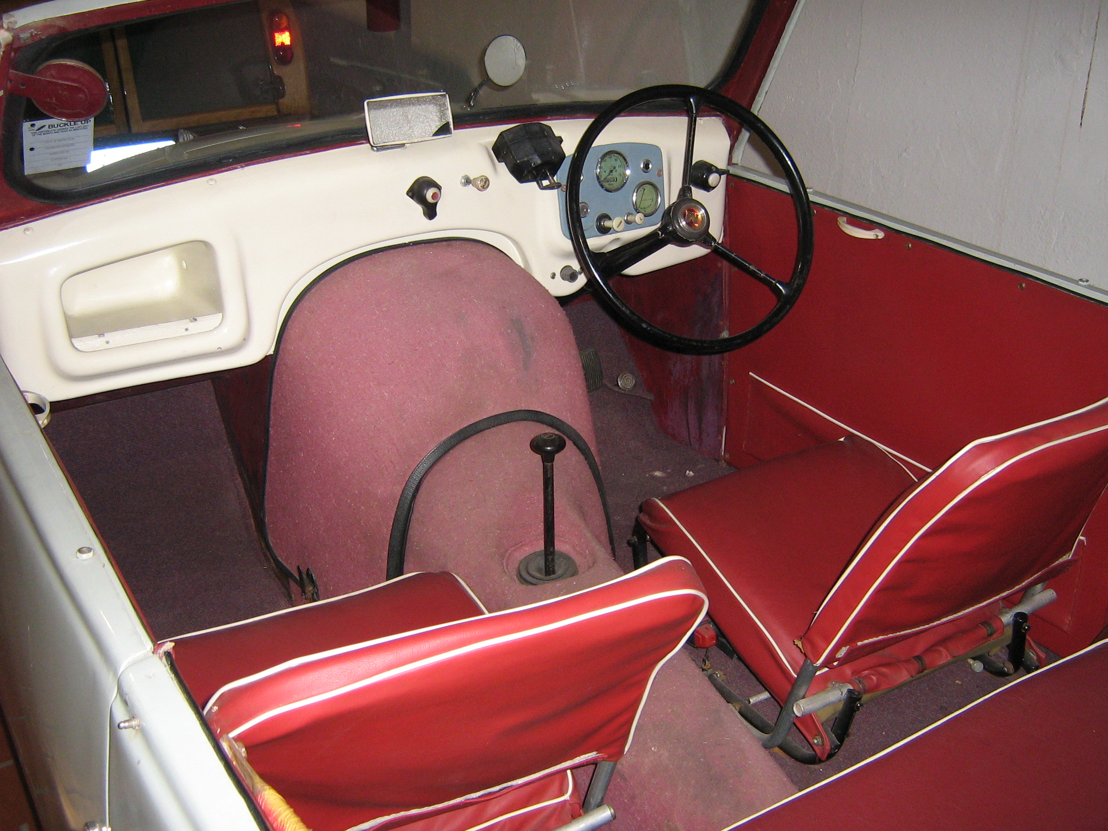 1957 Reliant Regal MkIII